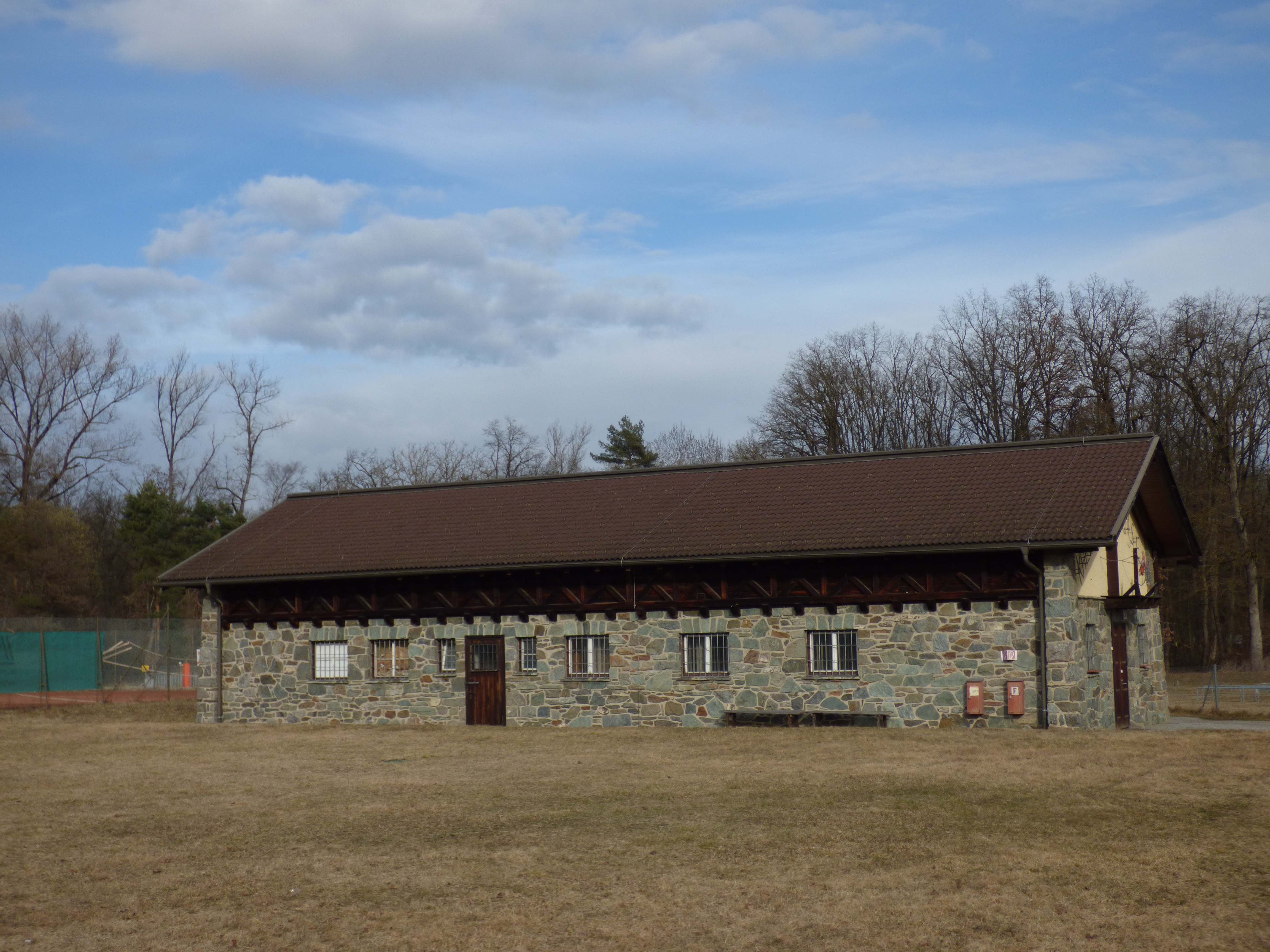 Khevenhüller-Kaserne Klagenfurt-Waltendorf Pferdeställe